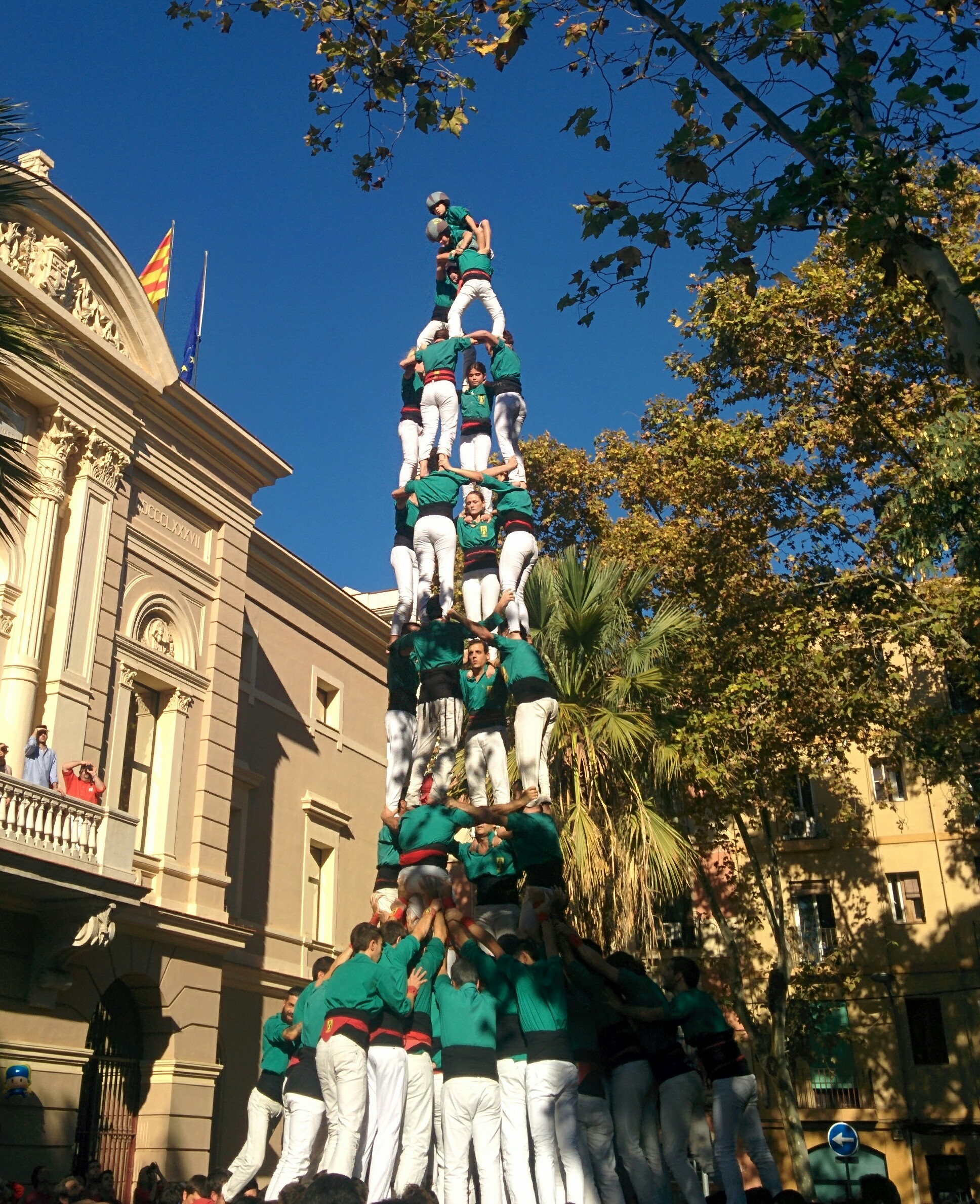 Primer 4de9 amb folre dels Castellers de Sabadell. Descarregat a la plaça Valentí Almirall de El Clot (Barcelona)